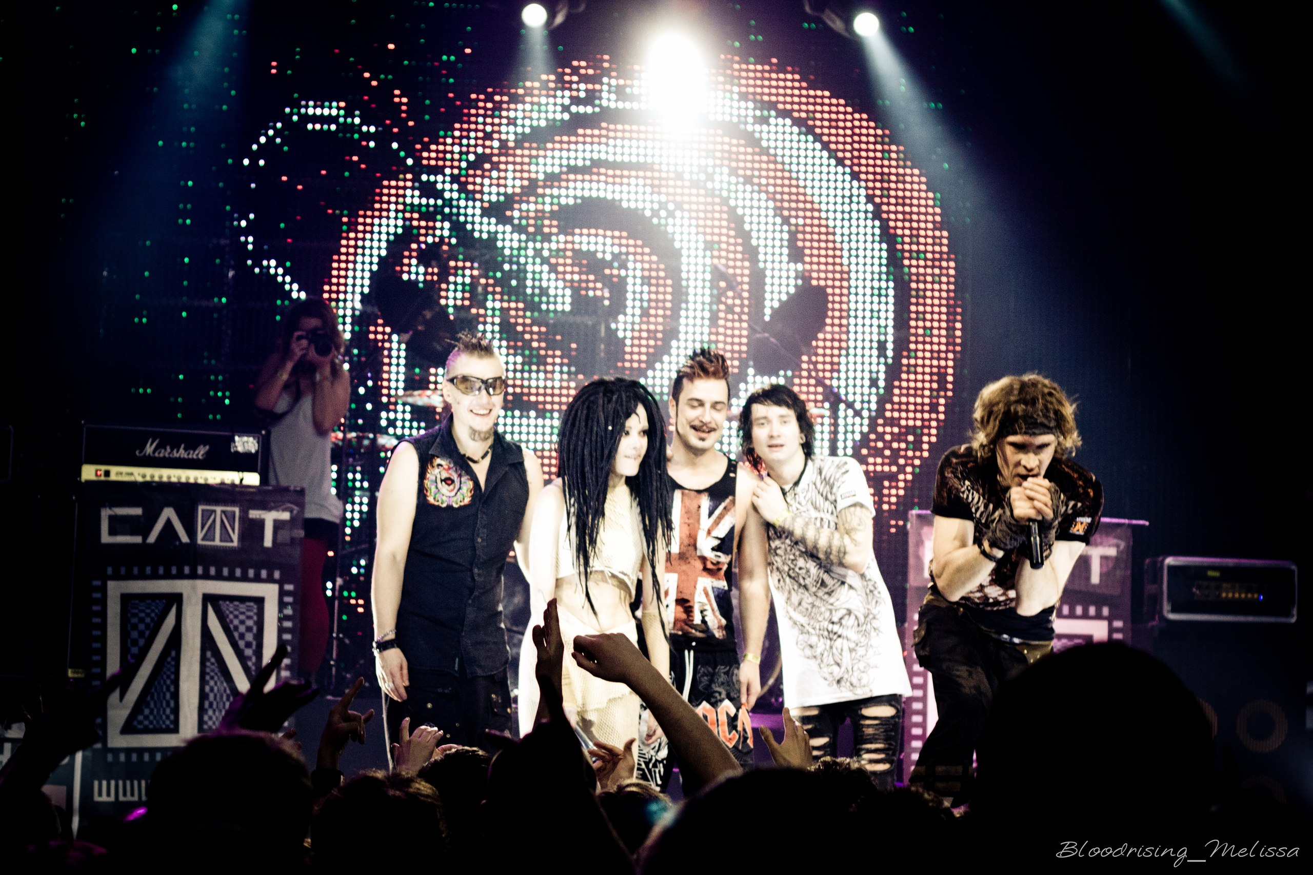 Концерт группы Слот, прошедший в Москве 9 апреля 2012 года.